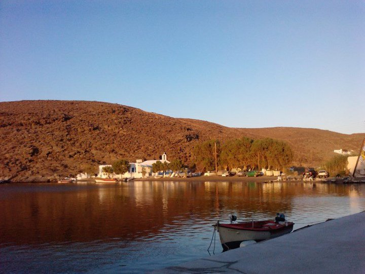 Αγια Ειρήνη, Κύθνος. Πάνω απο την εκκλησία διακρίνονται τα κενοτάφια των Λεωτσάκου, Μωραϊτίνη και Σκαρβέλη